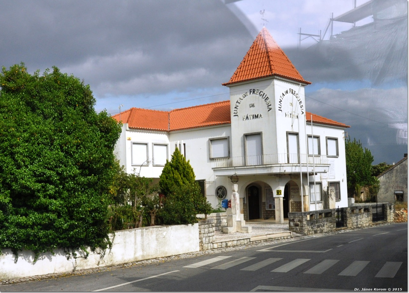 Fatima 0282